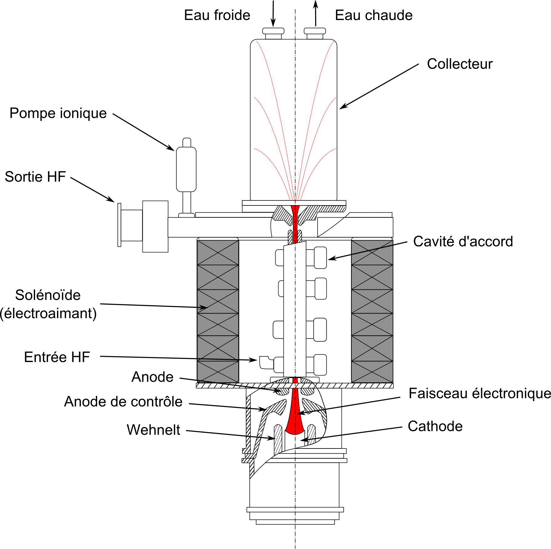 Klystron